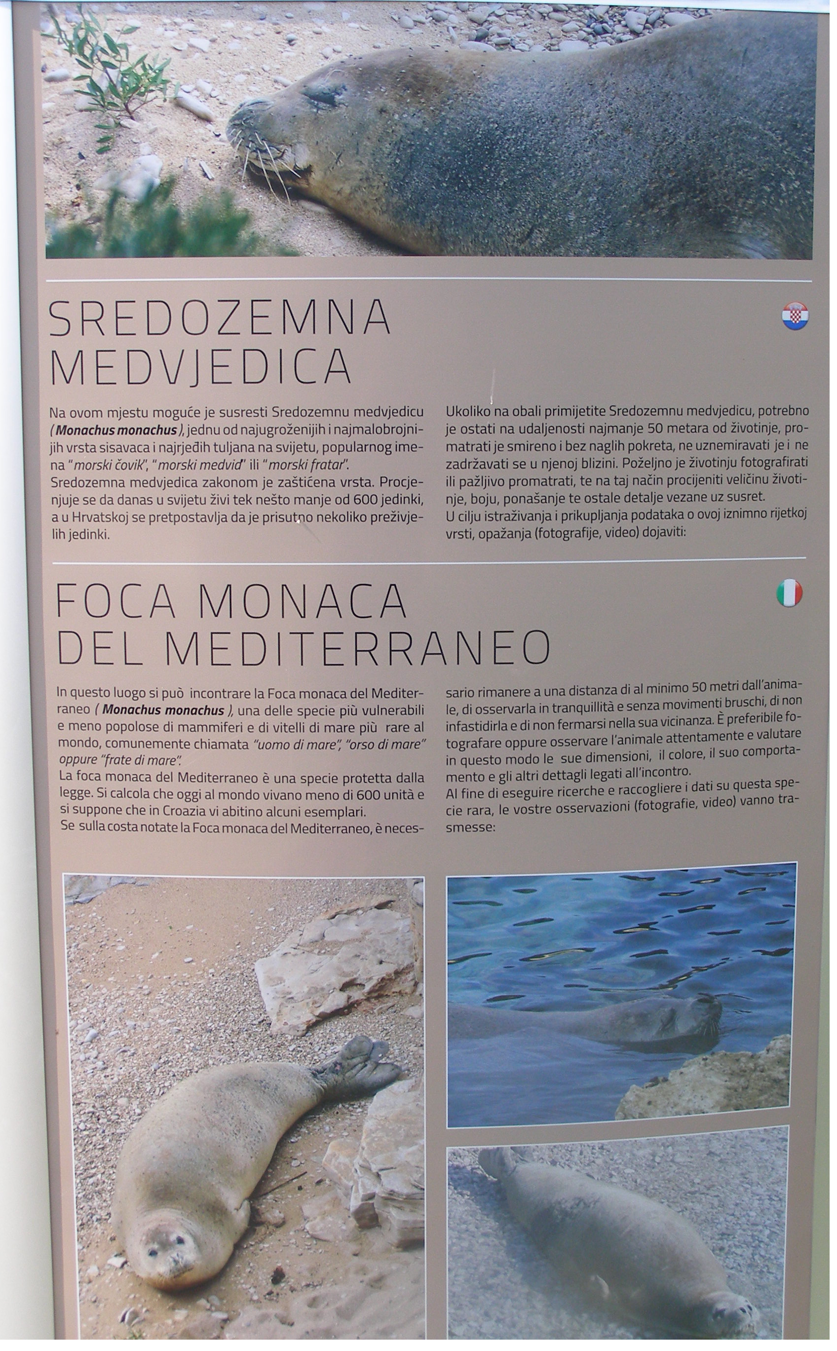 Infotafel Mönchsrobbenstrand in Pula/Kroatien